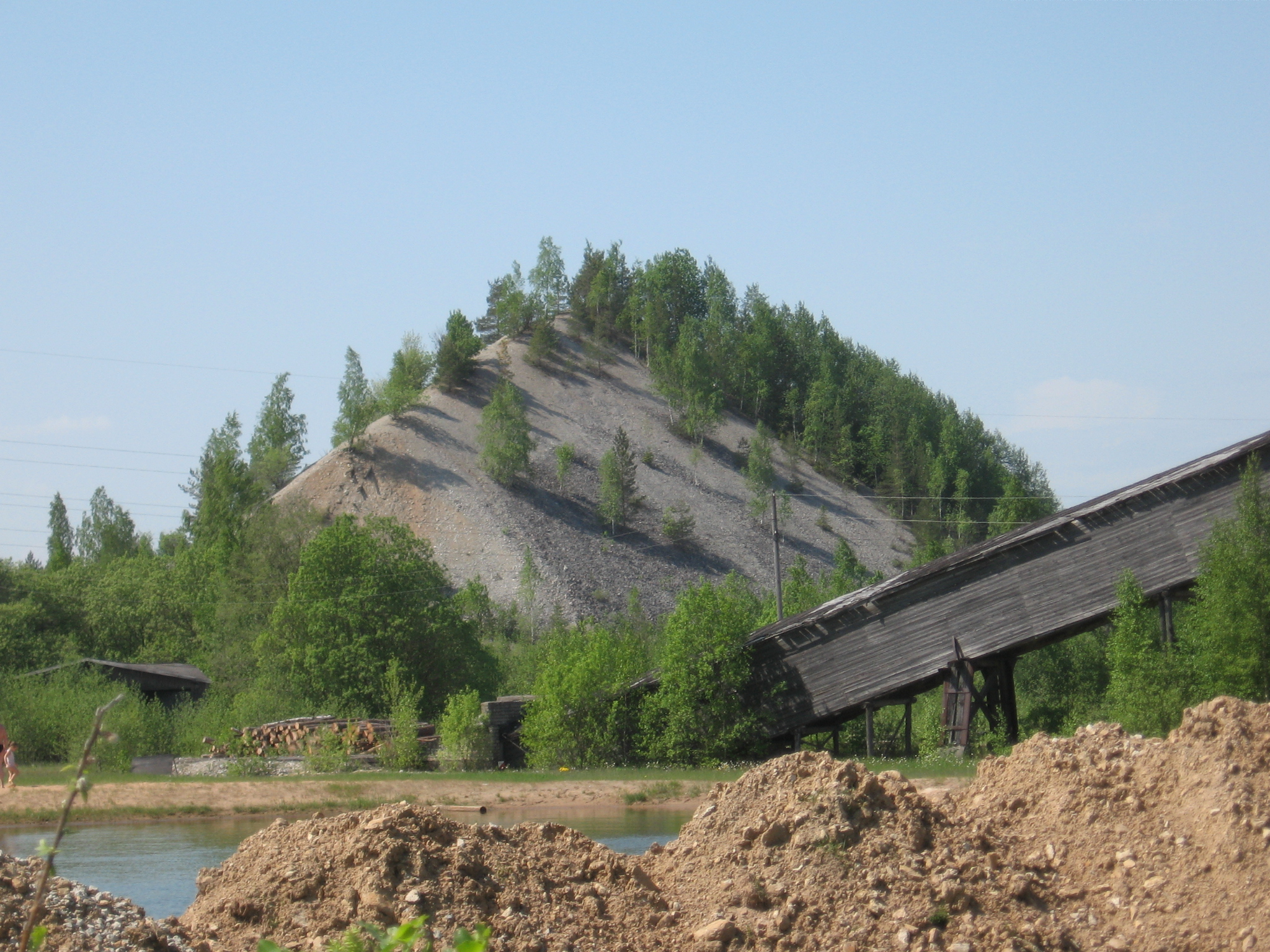 Kohtla-Nõmme aherainemägi